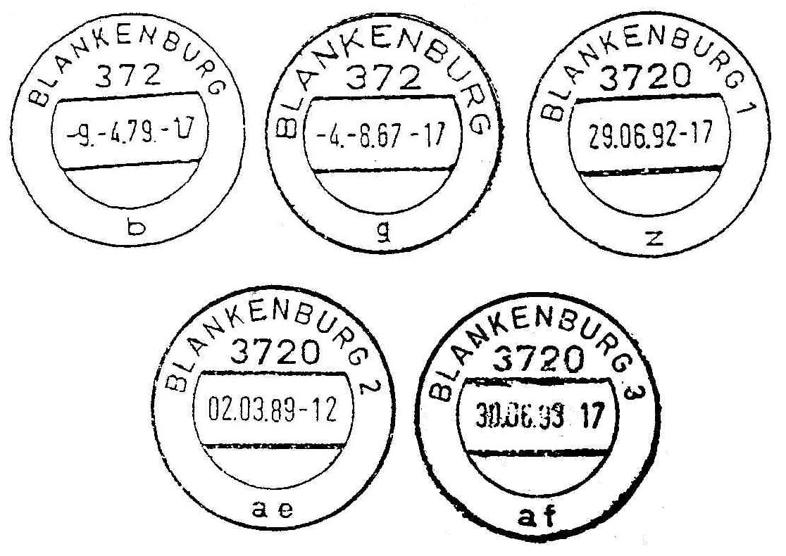 Stempel mit der Postleitzahle der Deutschen Post der DDR